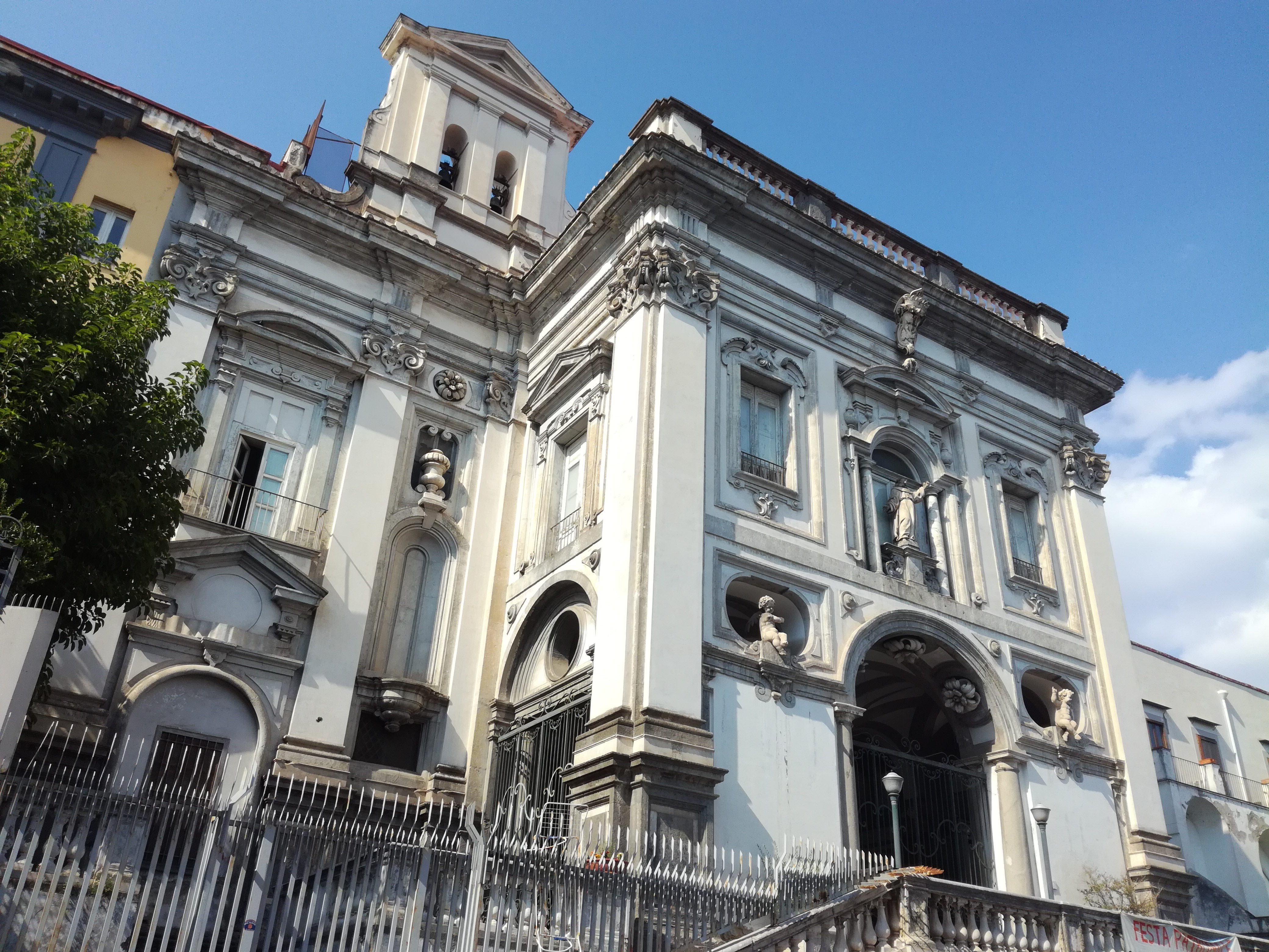 Facciata, Angeli, Napoli